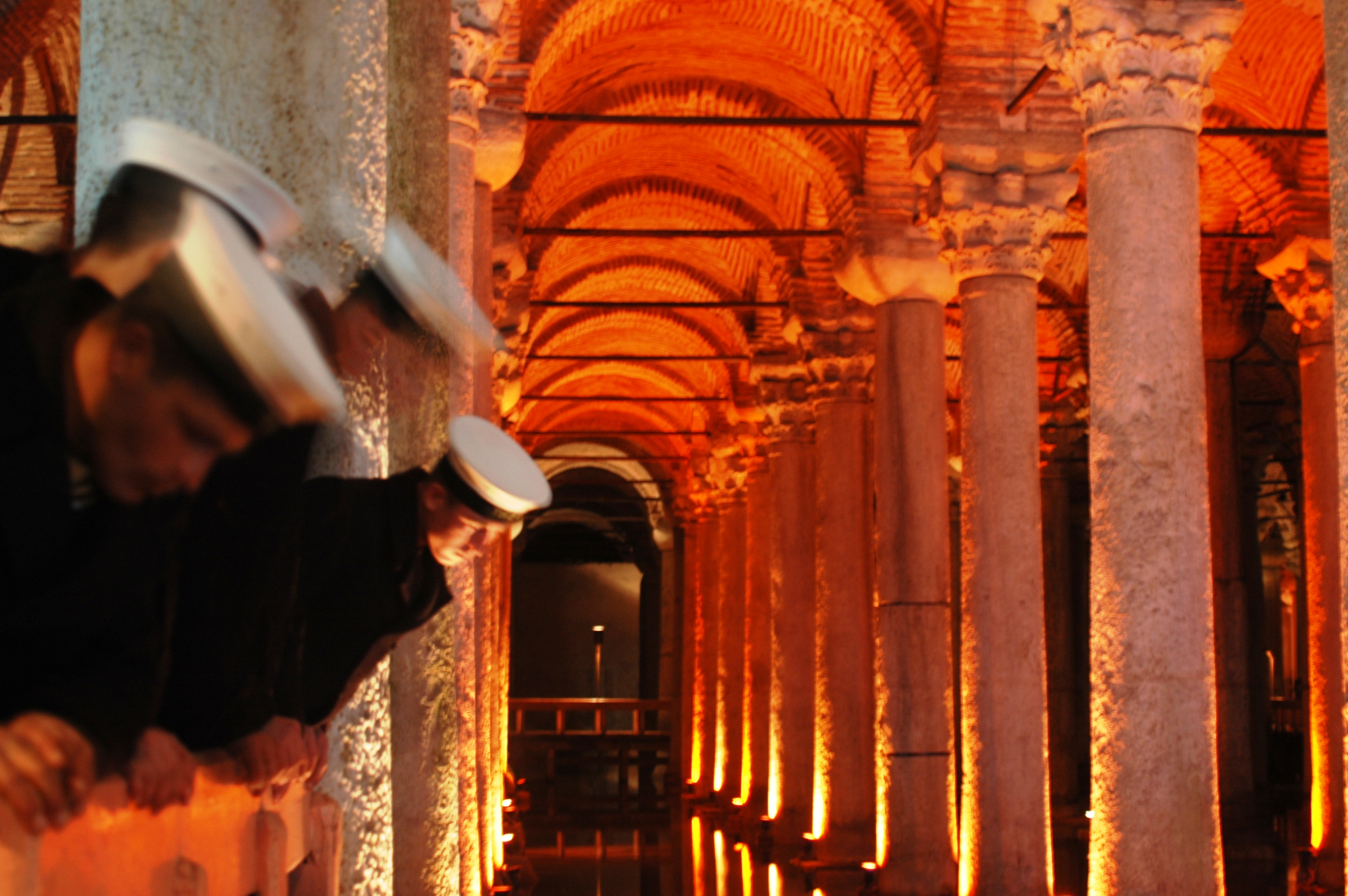 Istanbul - Cisterna de Yerebatan